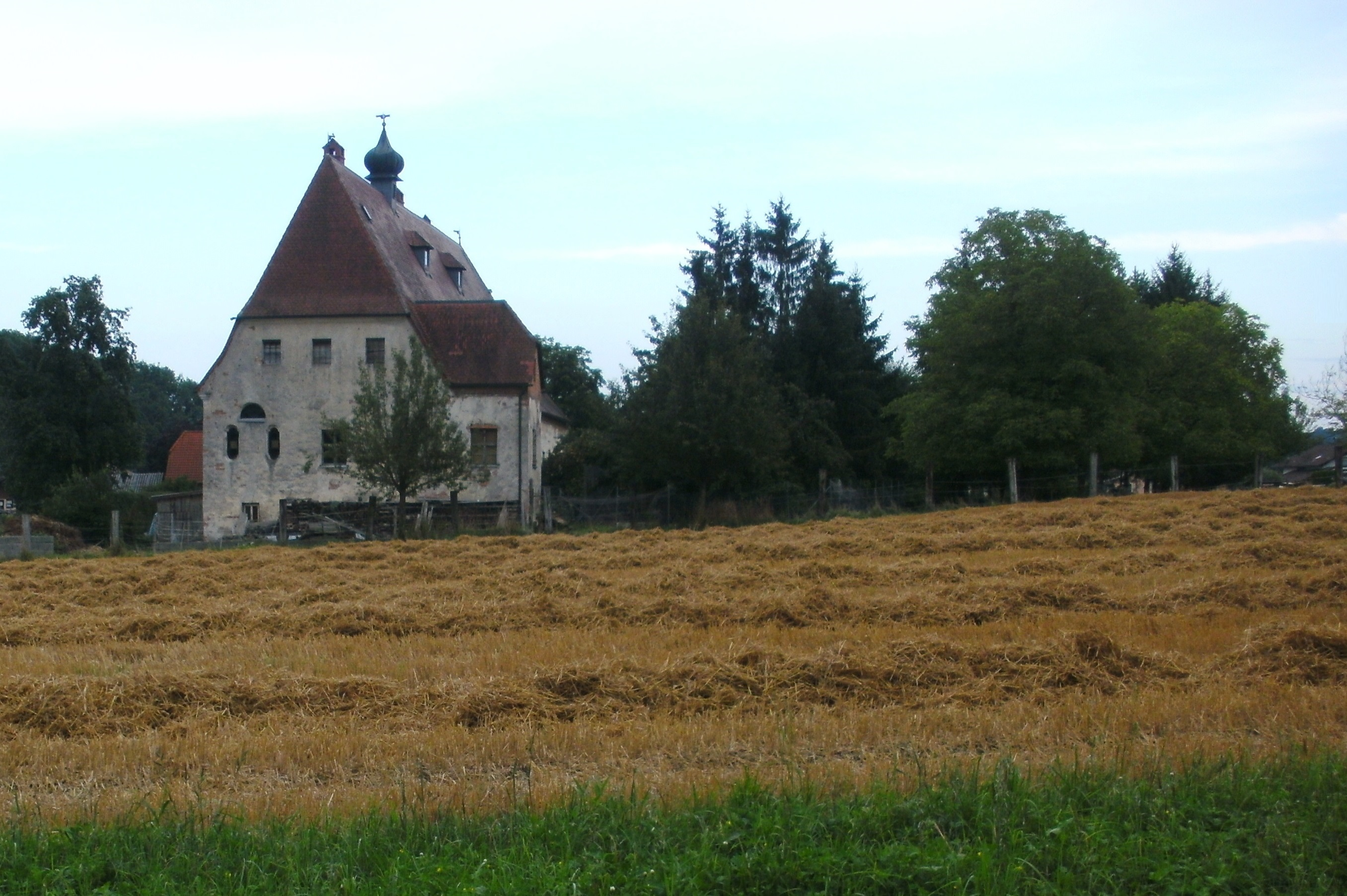 Schloss Hackledt, Gemeinde Eggerding, Bezirk Schärding, Oberöstereich. Zur Geschichte der Anlage und ihrer Besitzer siehe SEDDON Christopher R., Adelige Lebenswege zwischen Bayern und Österreich. Herrschaftsformen und Herrschaftsstrukturen des Landadels am unteren Inn in der Frühen Neuzeit, dargestellt am Beispiel der Herren und Freiherren von Hackledt, Wien (Diss.) 2009, S. 1160–1186 (detaillierte Besitzgeschichte von Schloss Hackledt).